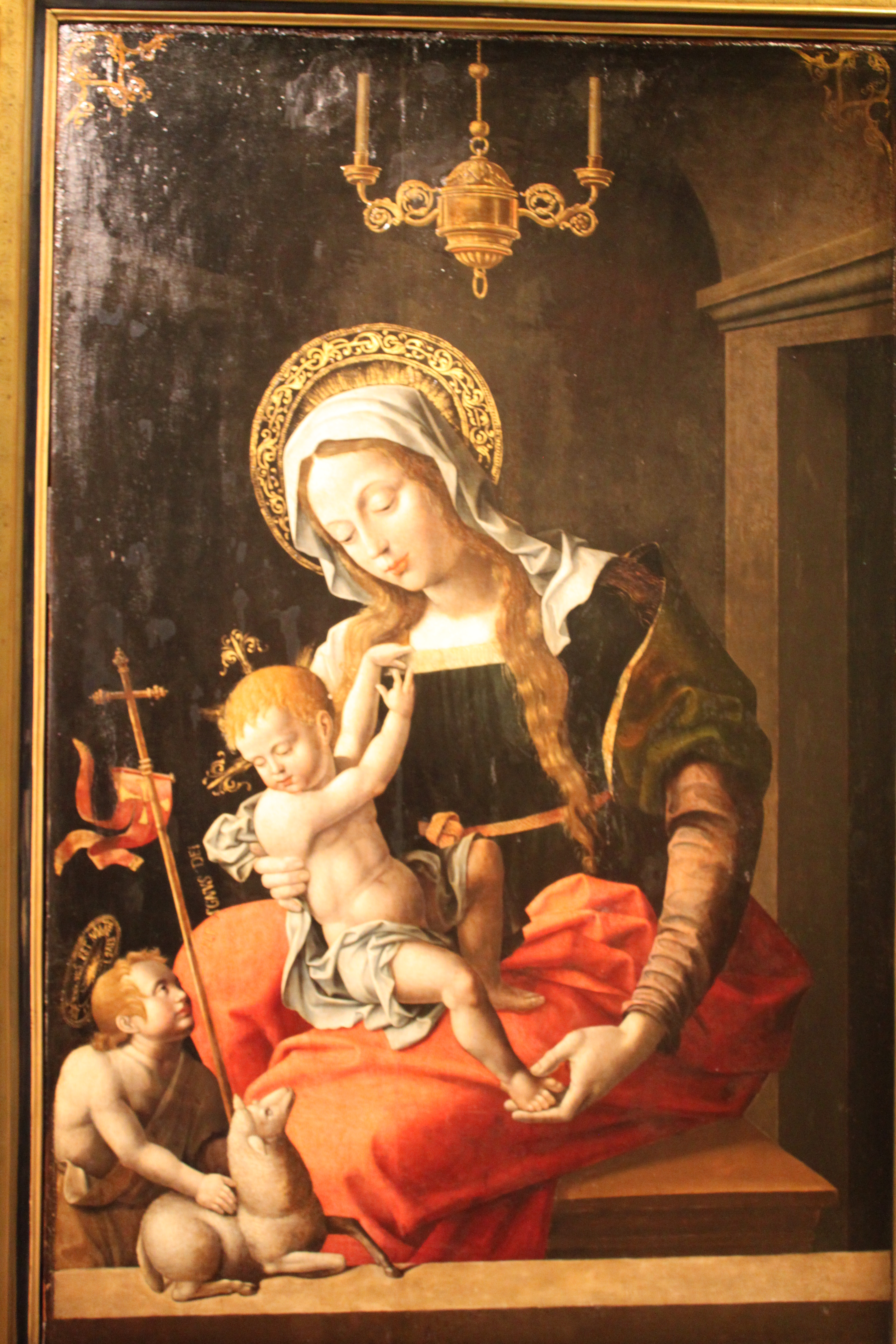 La Vierge, l'Enfant et saint Jean Baptiste - Huile sur bois (chêne) Grégoire Guérard - vers 1512-1515 - Dijon (France) -Musée des Beaux-Arts - Inventaire : 2775.